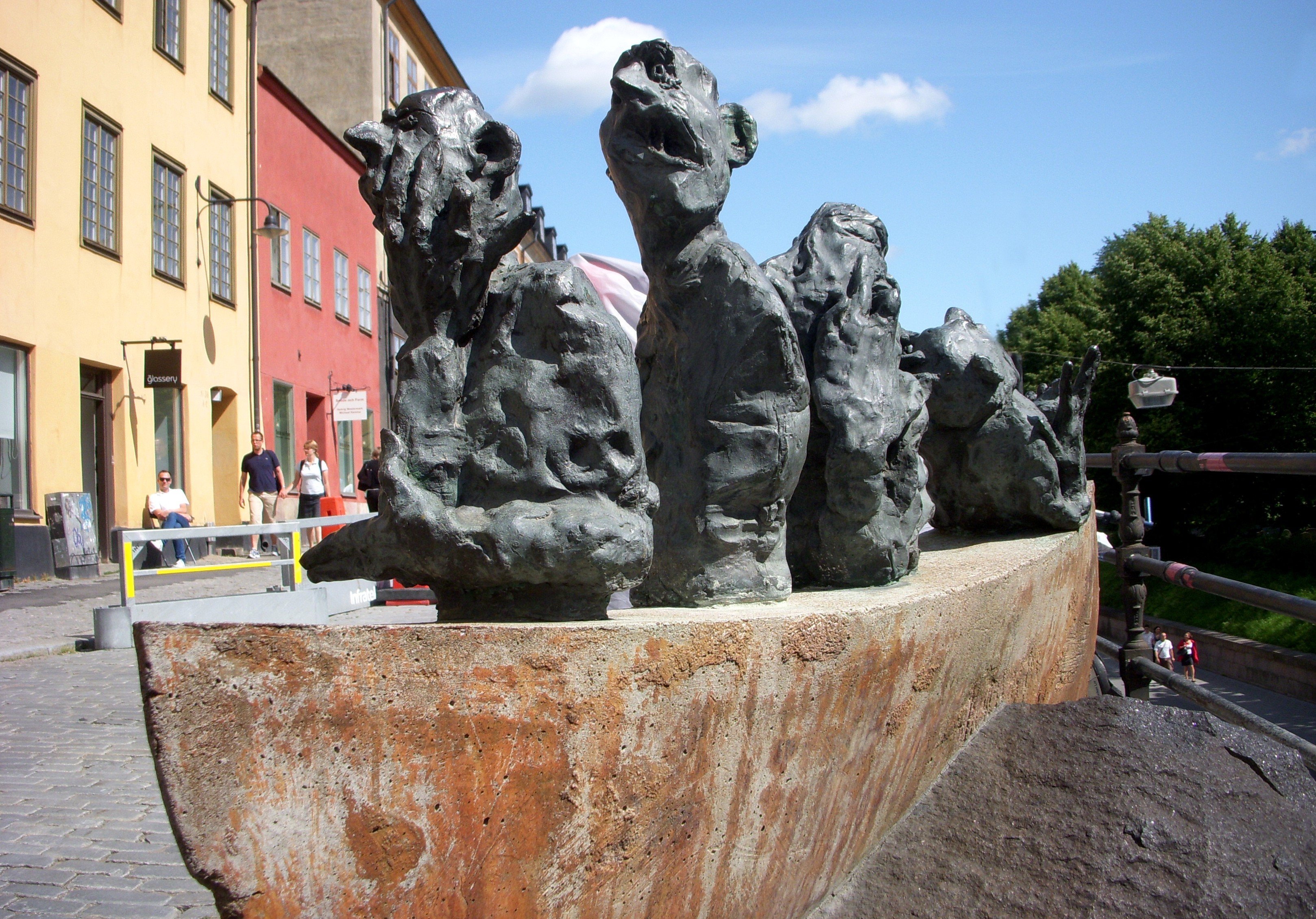 "Dårarnas båt" skulptur av Sture Collin på Hornsgatspuckeln, Södermalm, Stockholm